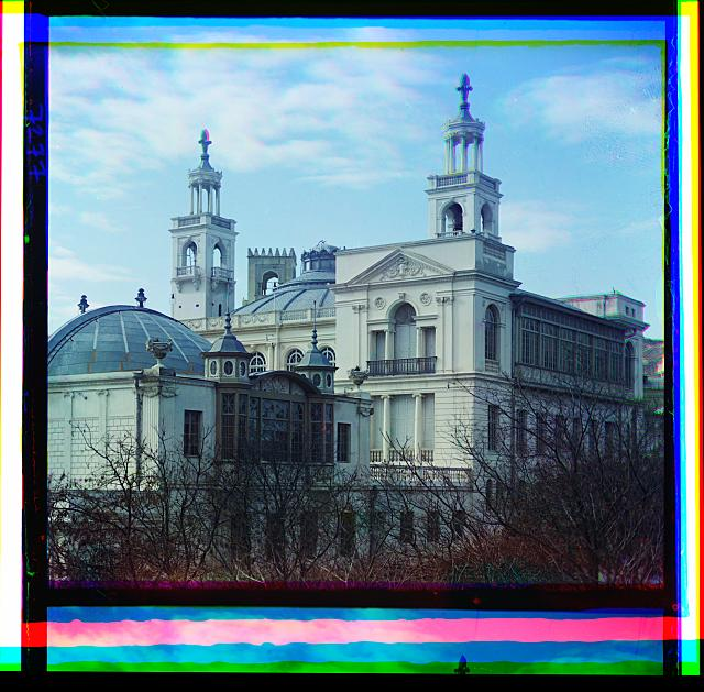 Филармония в 1912 году.